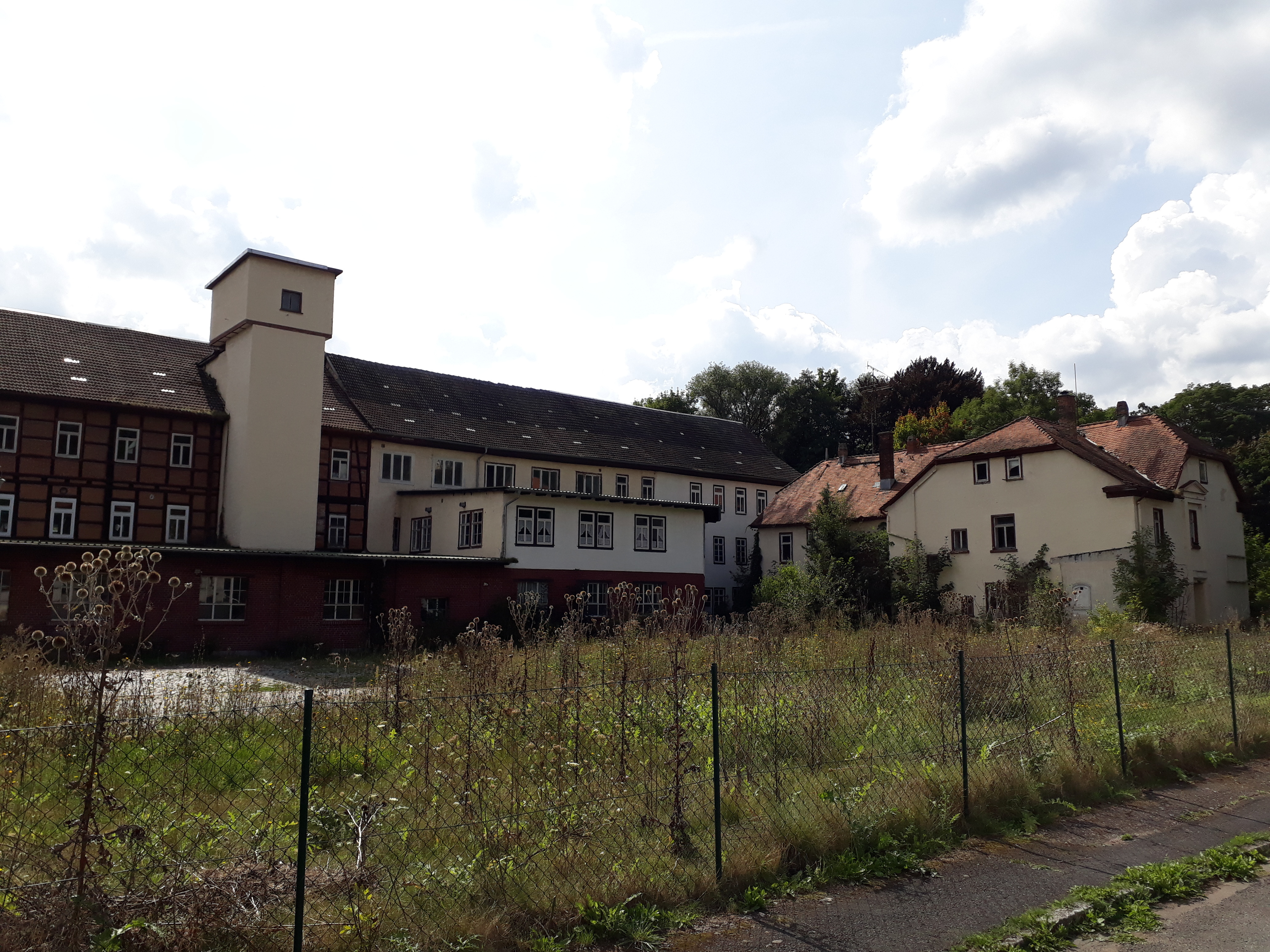 Gebäude der ehemaligen Porzellanmanufaktur in Plaue, Thüringen